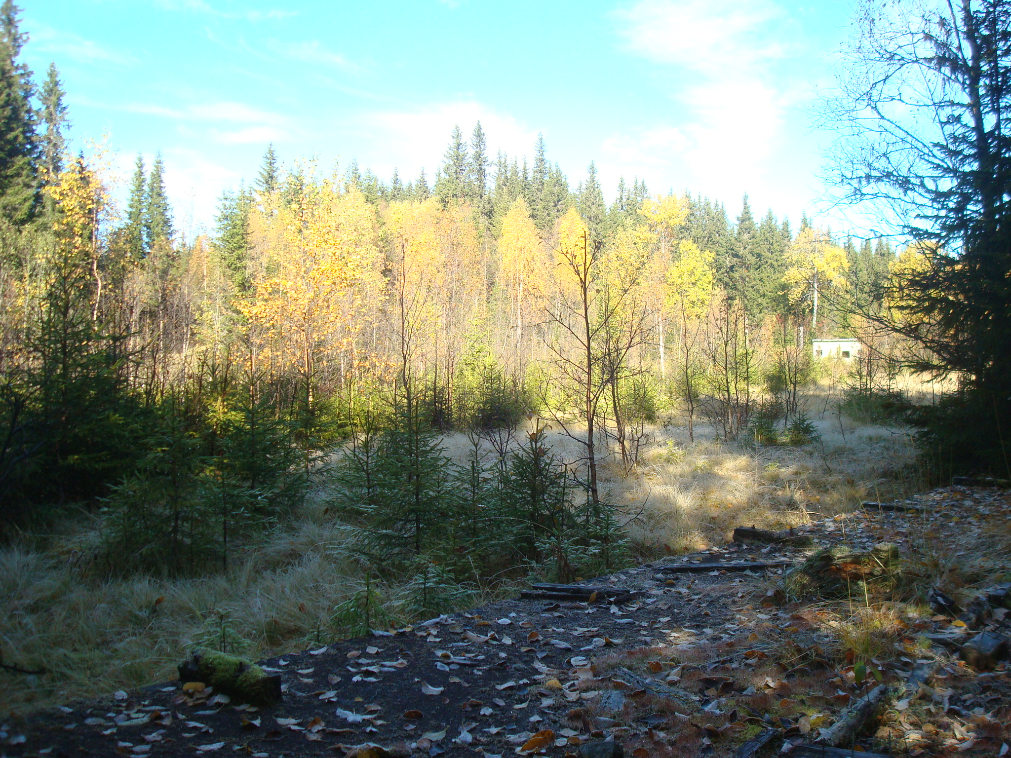 Snyta på Vest-Torpa